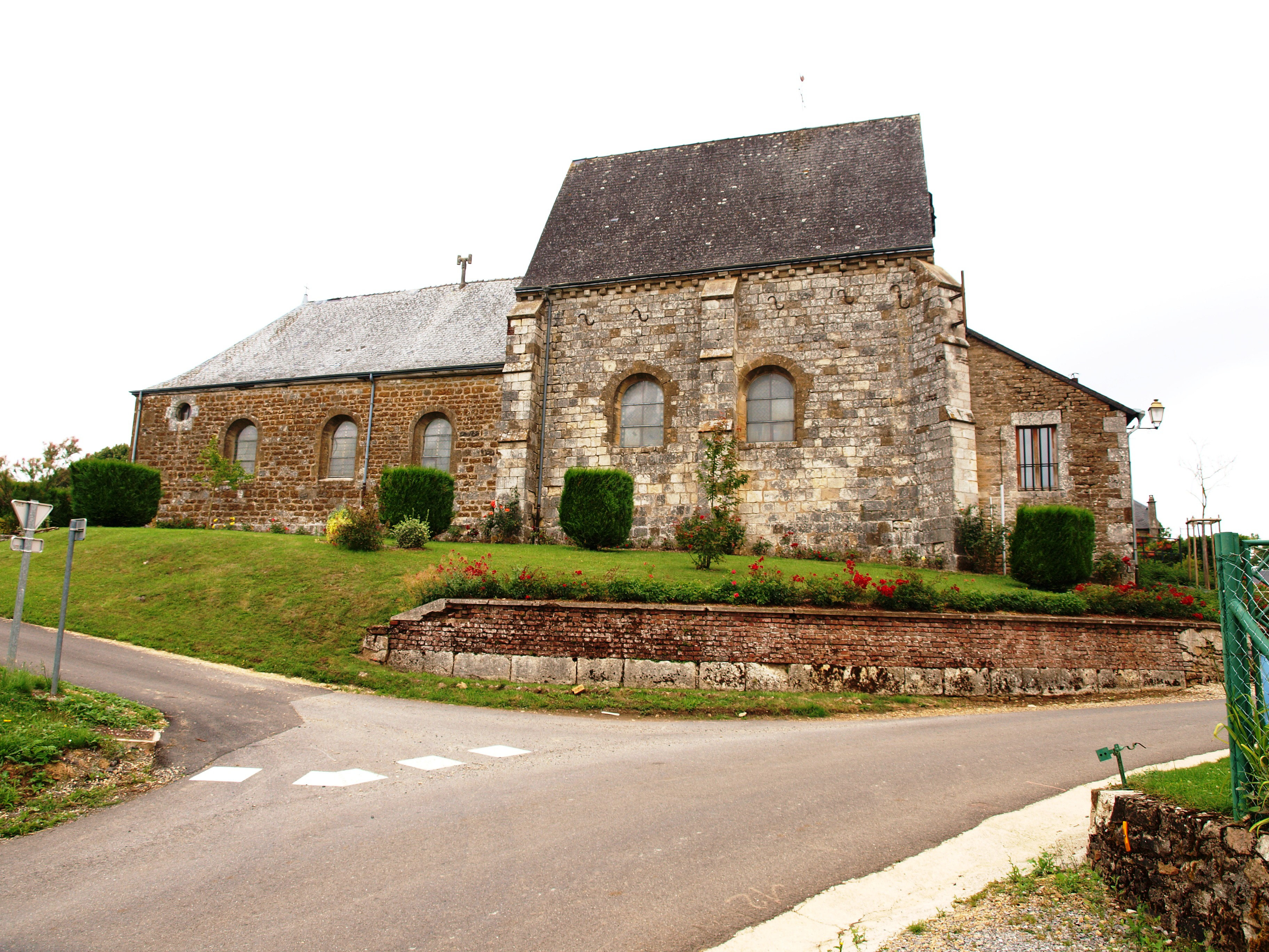 Villers-le-Tourneur (Ardennes, France)